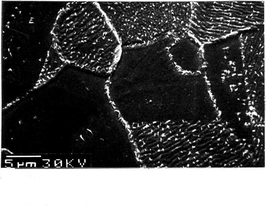 Pinning von Flusslinien an Korngrenzen in einer PBIn-Probe bei 1 K.